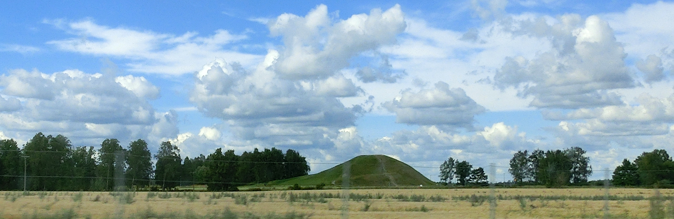 Ströbo hög (RAÄ-nummer Köping 56:1) är här sedd från E18 utanför Köping, Köpings kommun, Västmanlands län, Västmanland, Sverige.